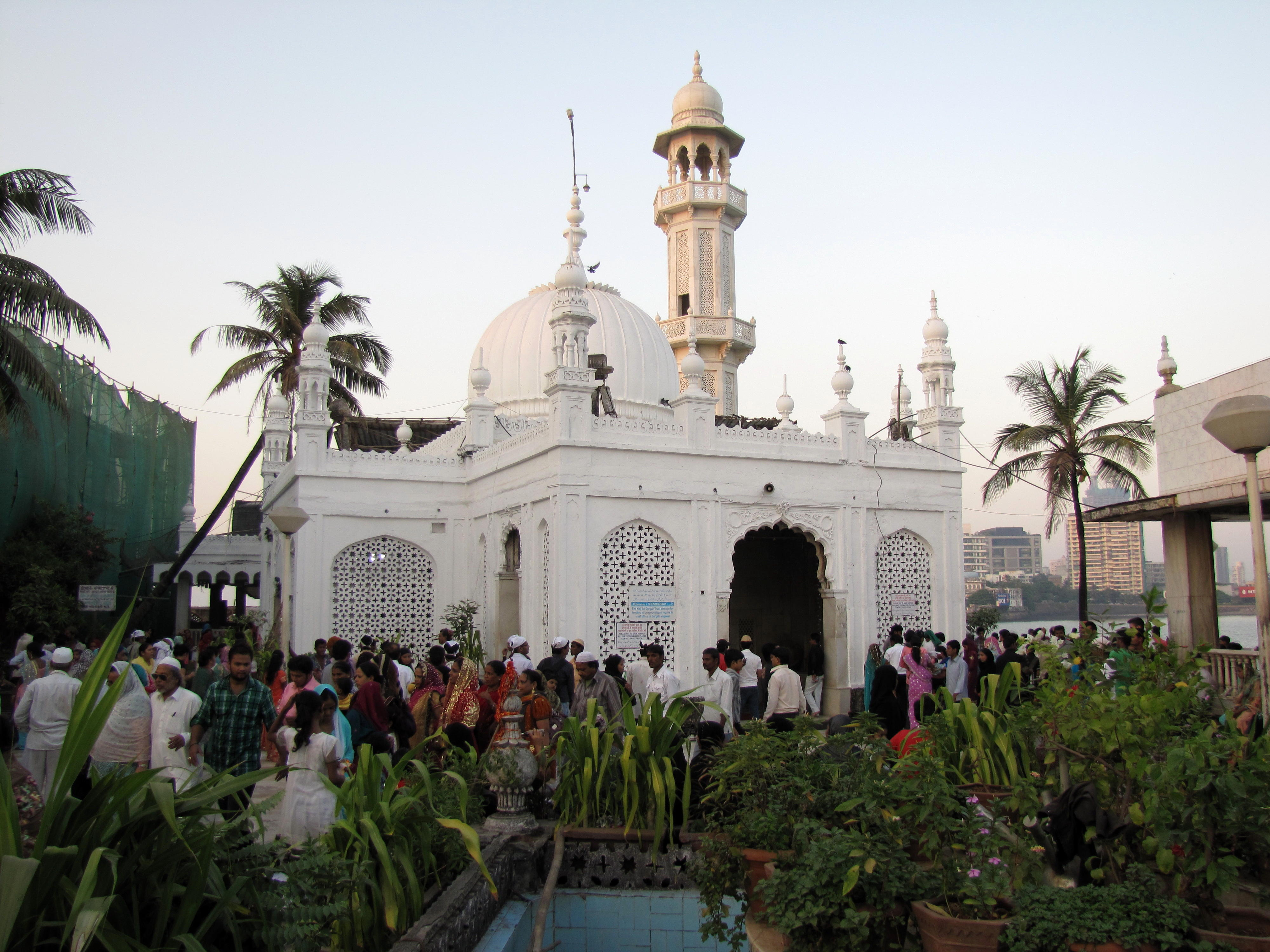 Haji Ali Darga in Mumbai